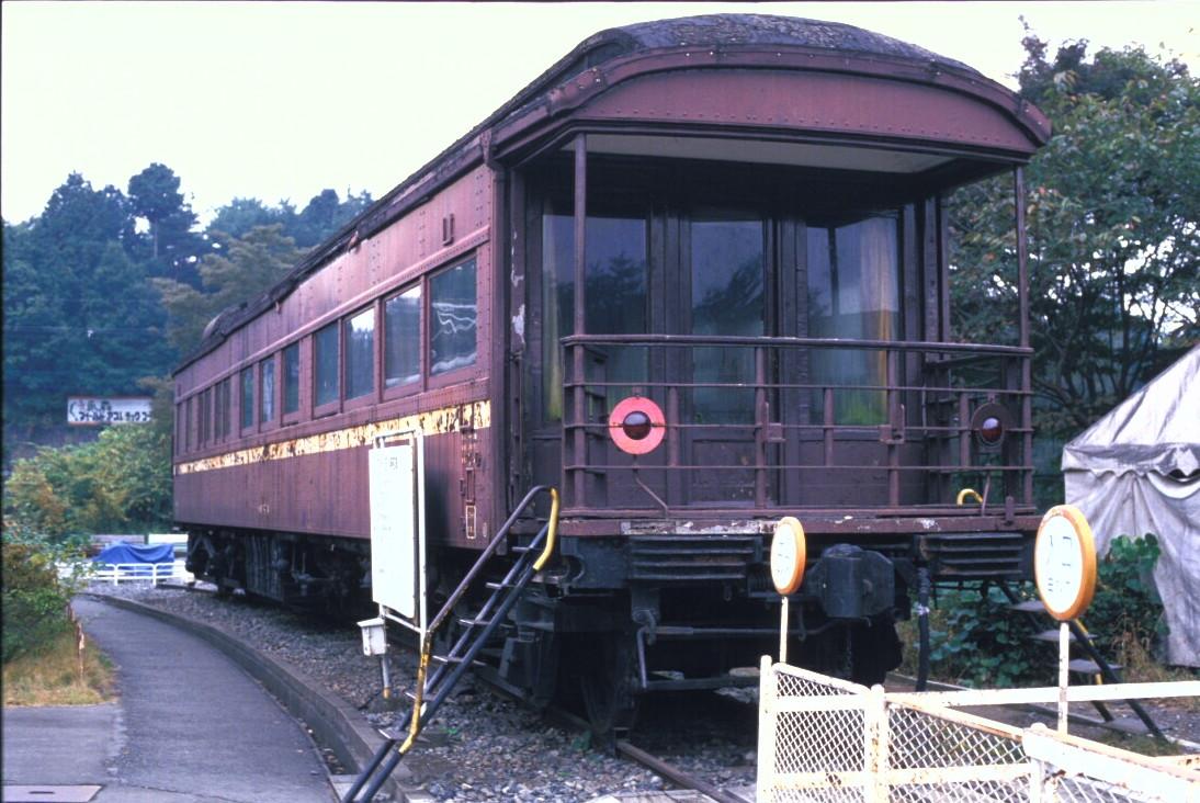 マイテ3911/青梅鉄道公園